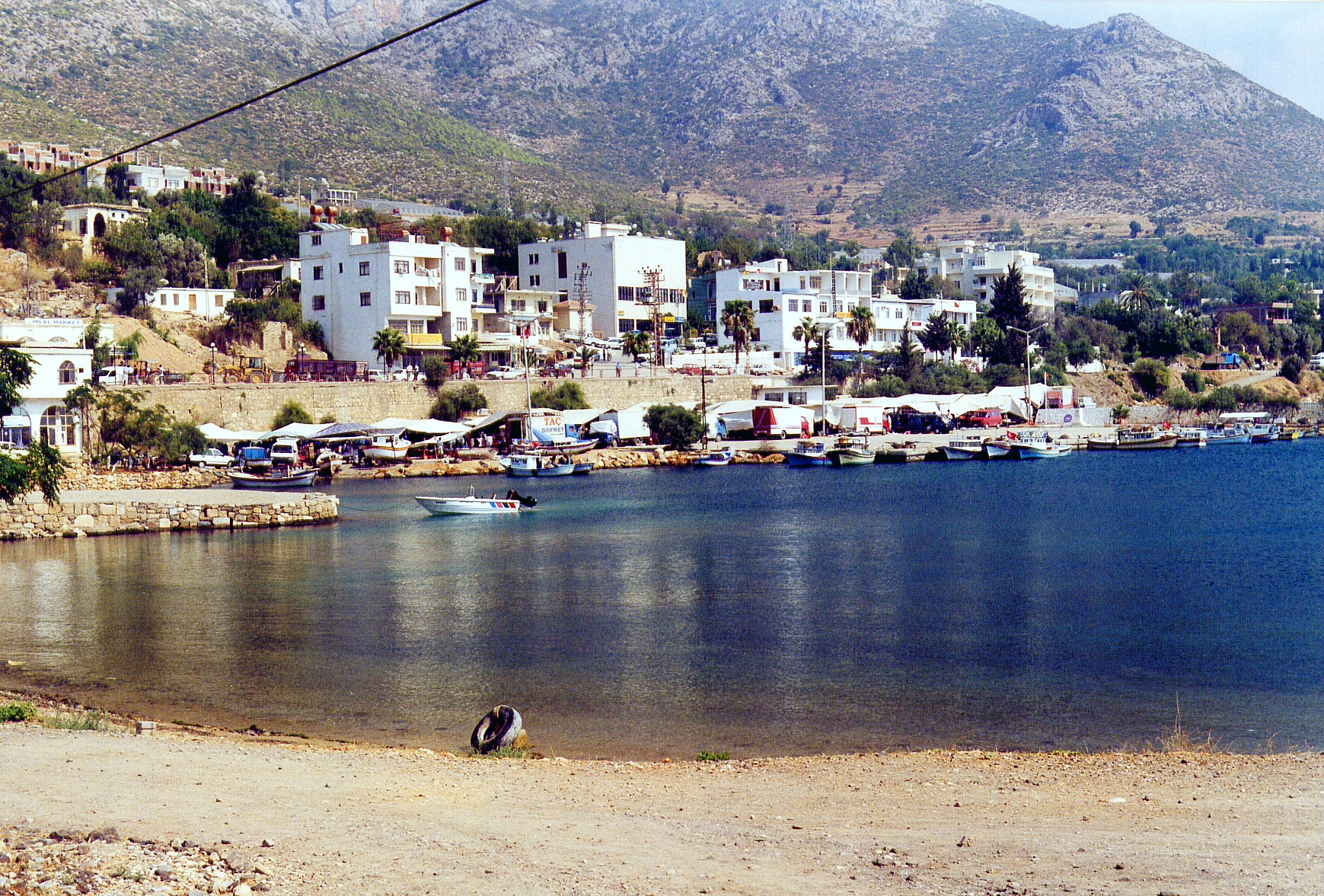 Bucht von Aydıncık, Südtürkei